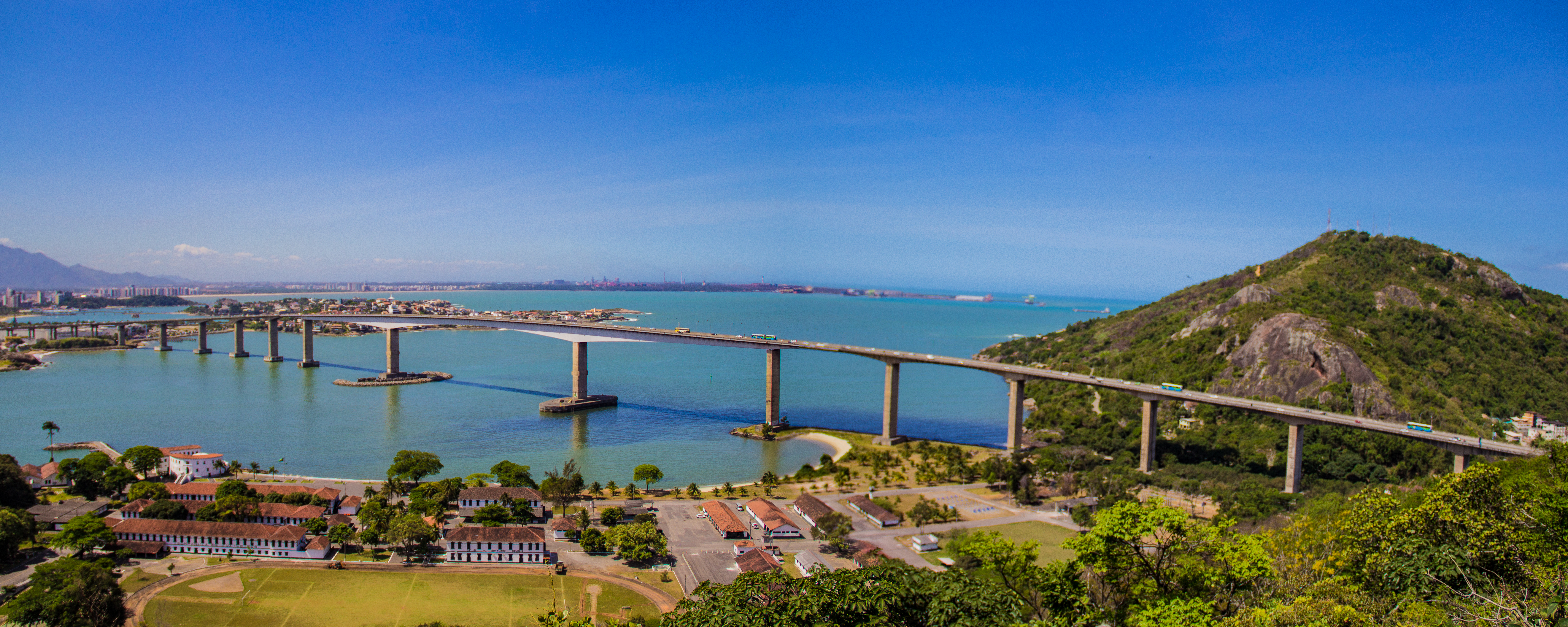 Vista Panorâmica Terceira Ponte em Vitória (Espírito Santo) vista do Convento da Penha